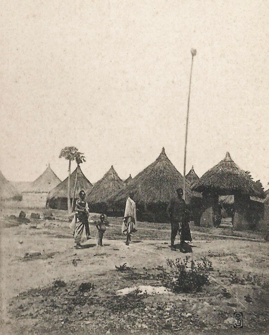 Diakolidougou près Beyla. La tête de Diali Amara, griot et conseiller de Samory qui organisa et ordonna le massacre de la mission Braulot (août 1897). Logo SFE (Société française d'électrographie) Colonies françaises. Haute-Guinée.